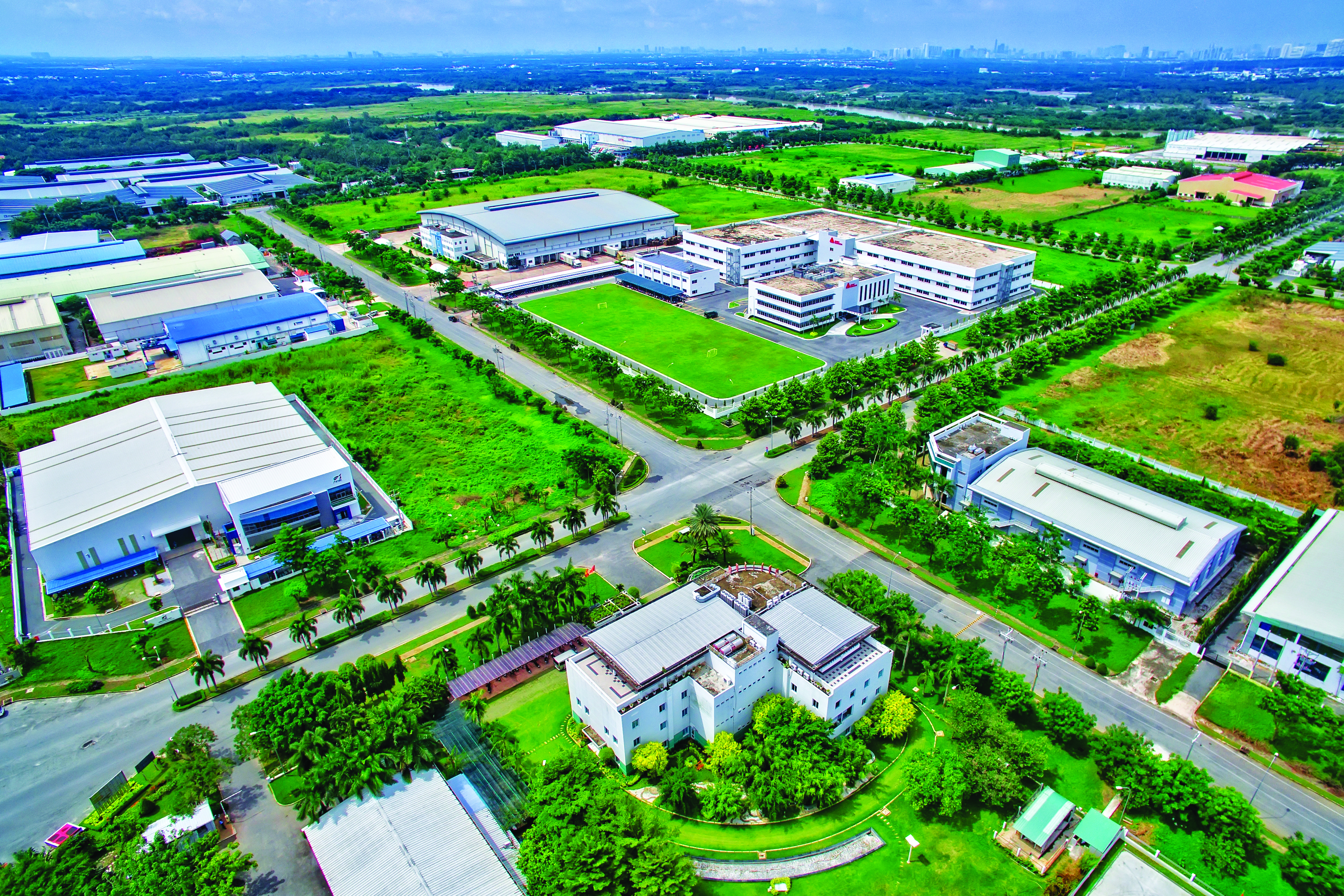 Một góc KCN Long Hậu được chụp bằng flycam